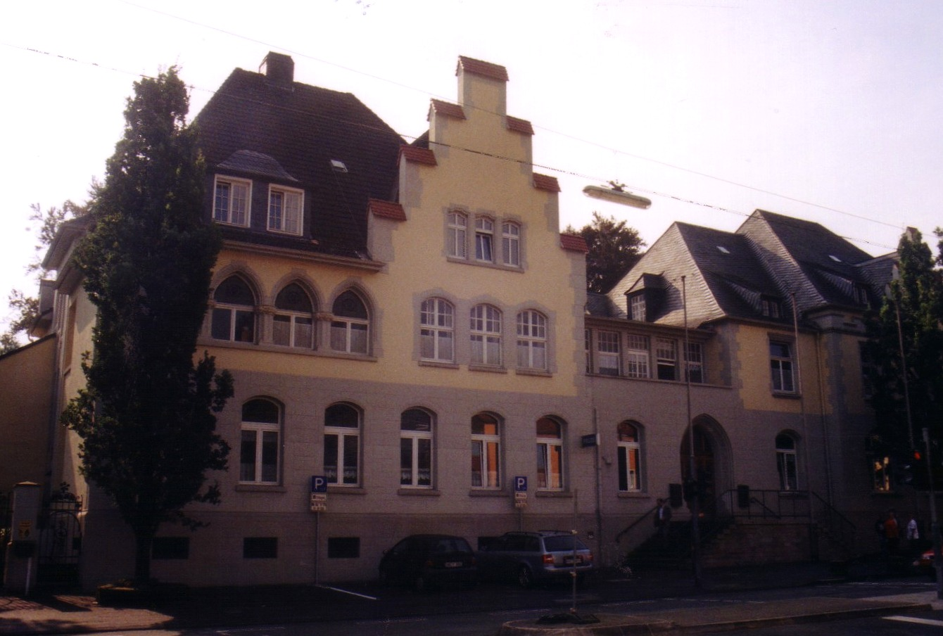 Amtshaus in Hagen-Boele, links der Anbau von 1912-14, rechts der ältere Teil von 1901